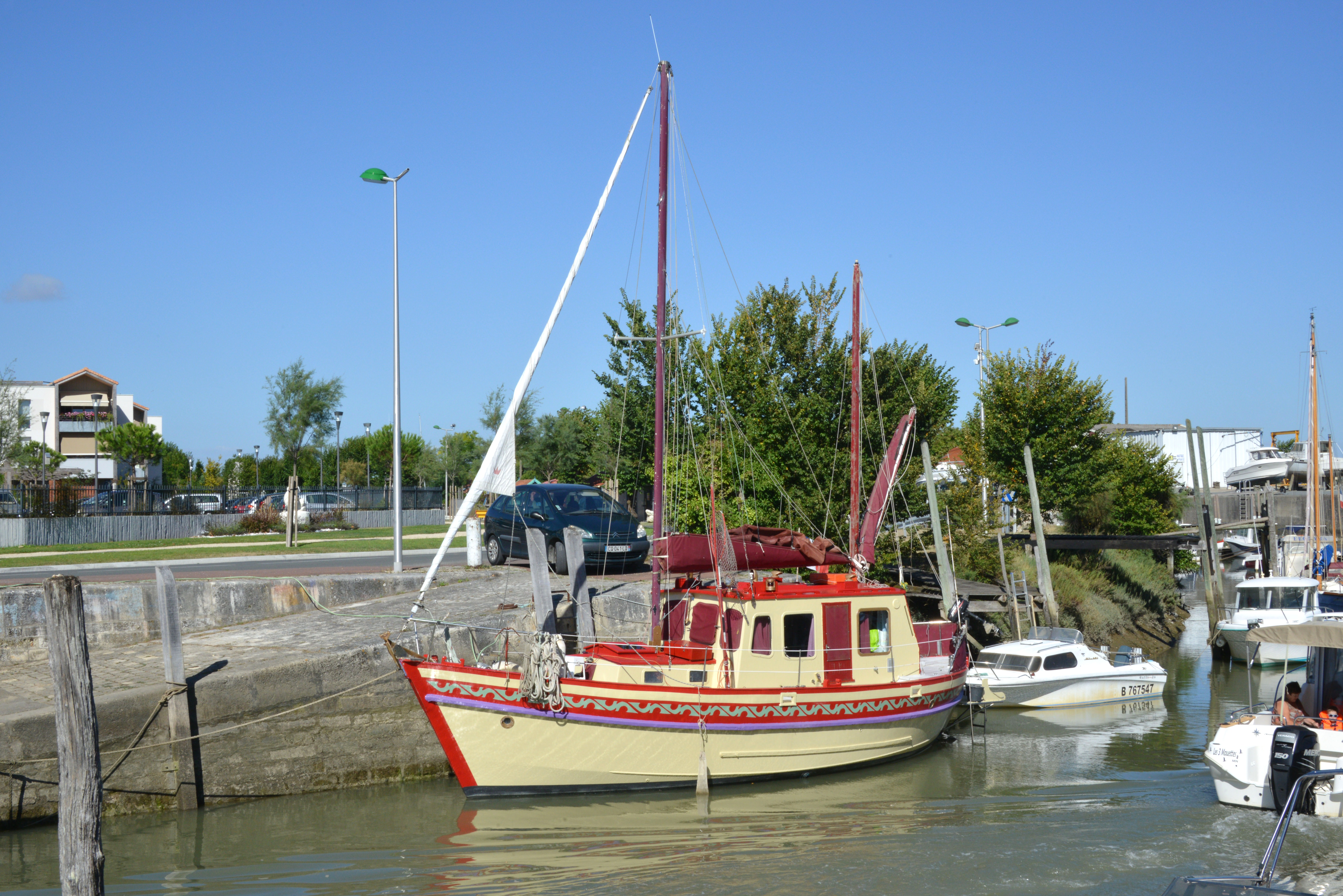 Le voilier « Tiot Galibot » amarré dans le Canal de La Tremblade. Ce bateau de plaisance a été construit en Finlande en 1962. Il mesure 10,60 mètres de long. Sa coque est en bois. « Tiot Galibot » est gréé en ketch. Immatriculation : PV C33216E. La Tremblade, Charente-Maritime, France.